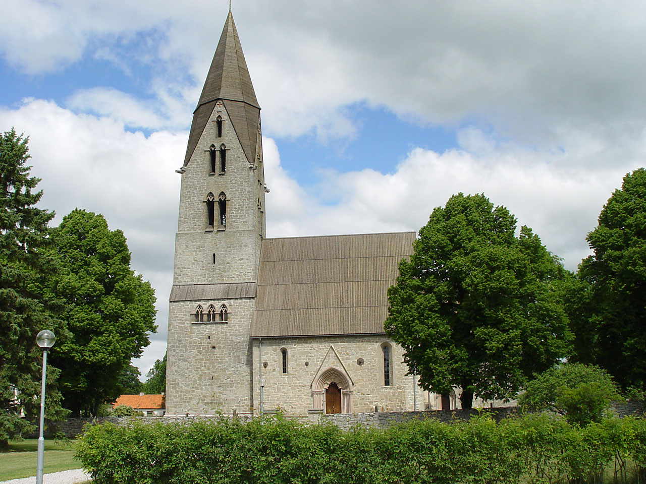 Öja kyrka auf Gotland. Turm von 1360 (Höhe 67m), Baumeister Egypticus